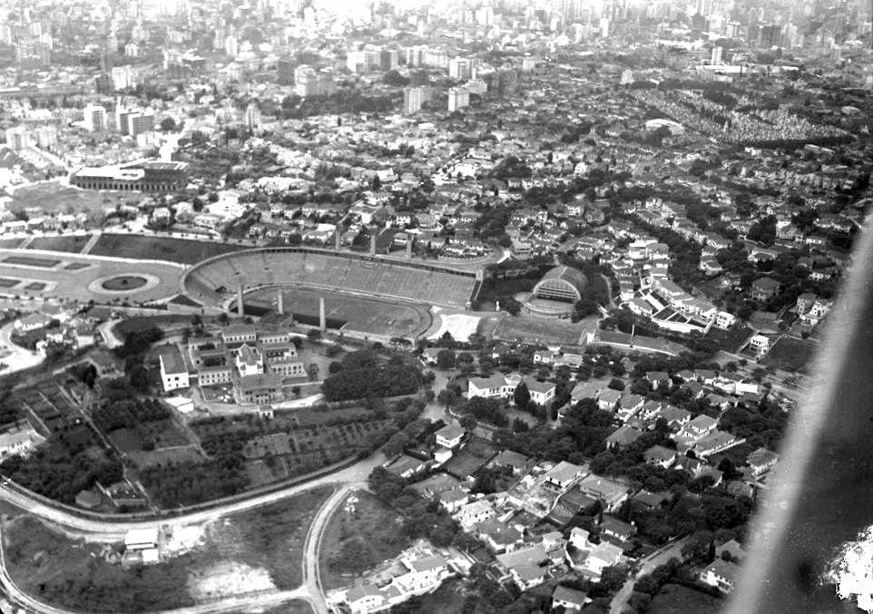 Obra que integra o acervo do Museu Paulista da USP. Coleção Werner Haberkorn